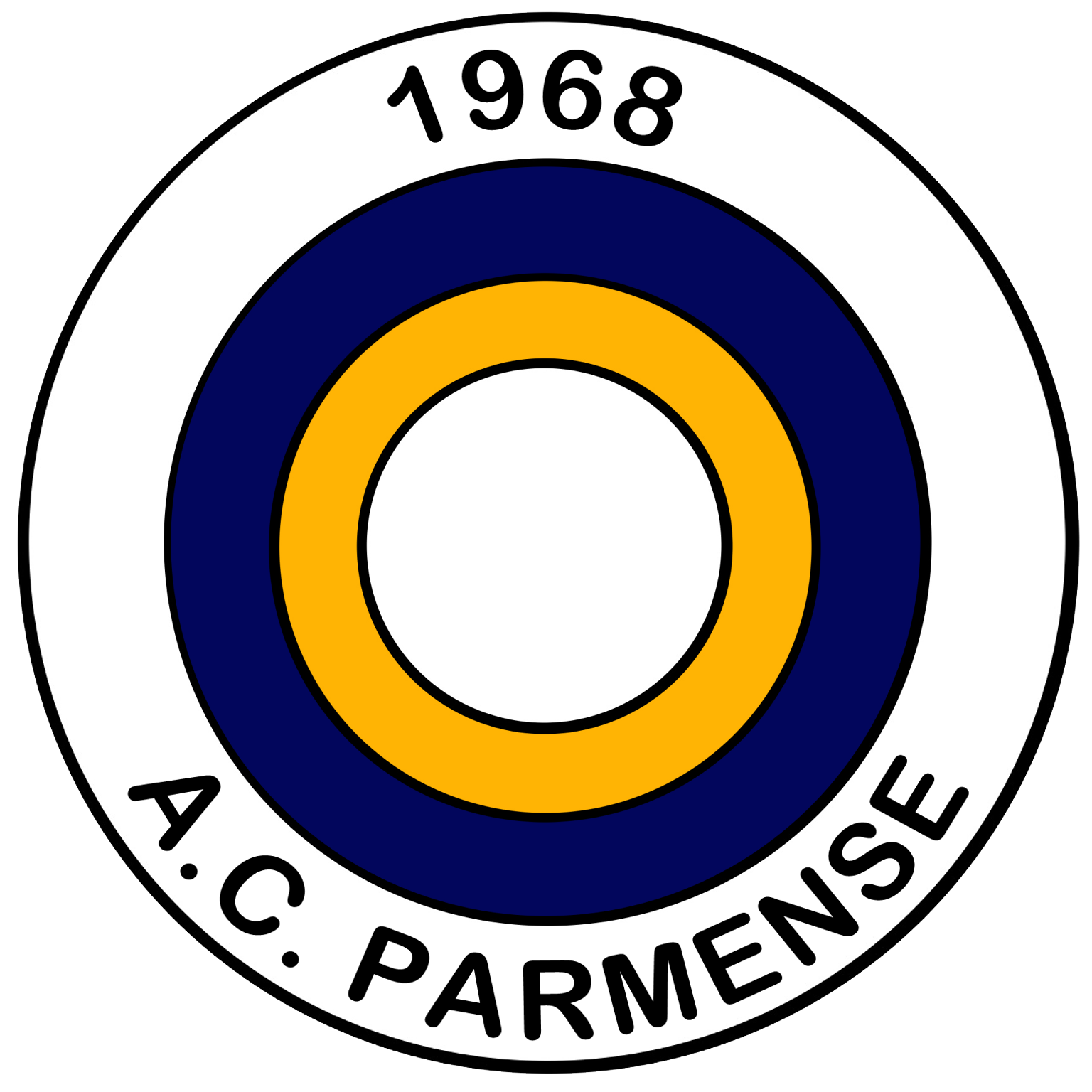 Il logo della AC Parmense 1968, società calcistica che diventerà in seguito Parma AC.